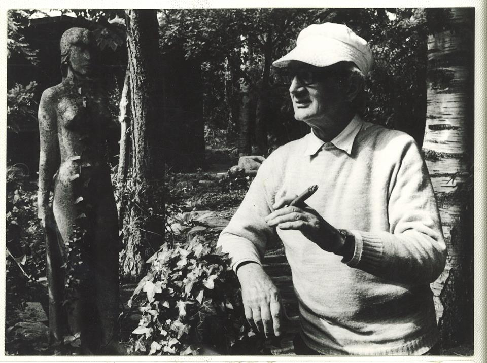 Arne Bang omkring år 1972, med en af de figurer han havde stående i sin have.